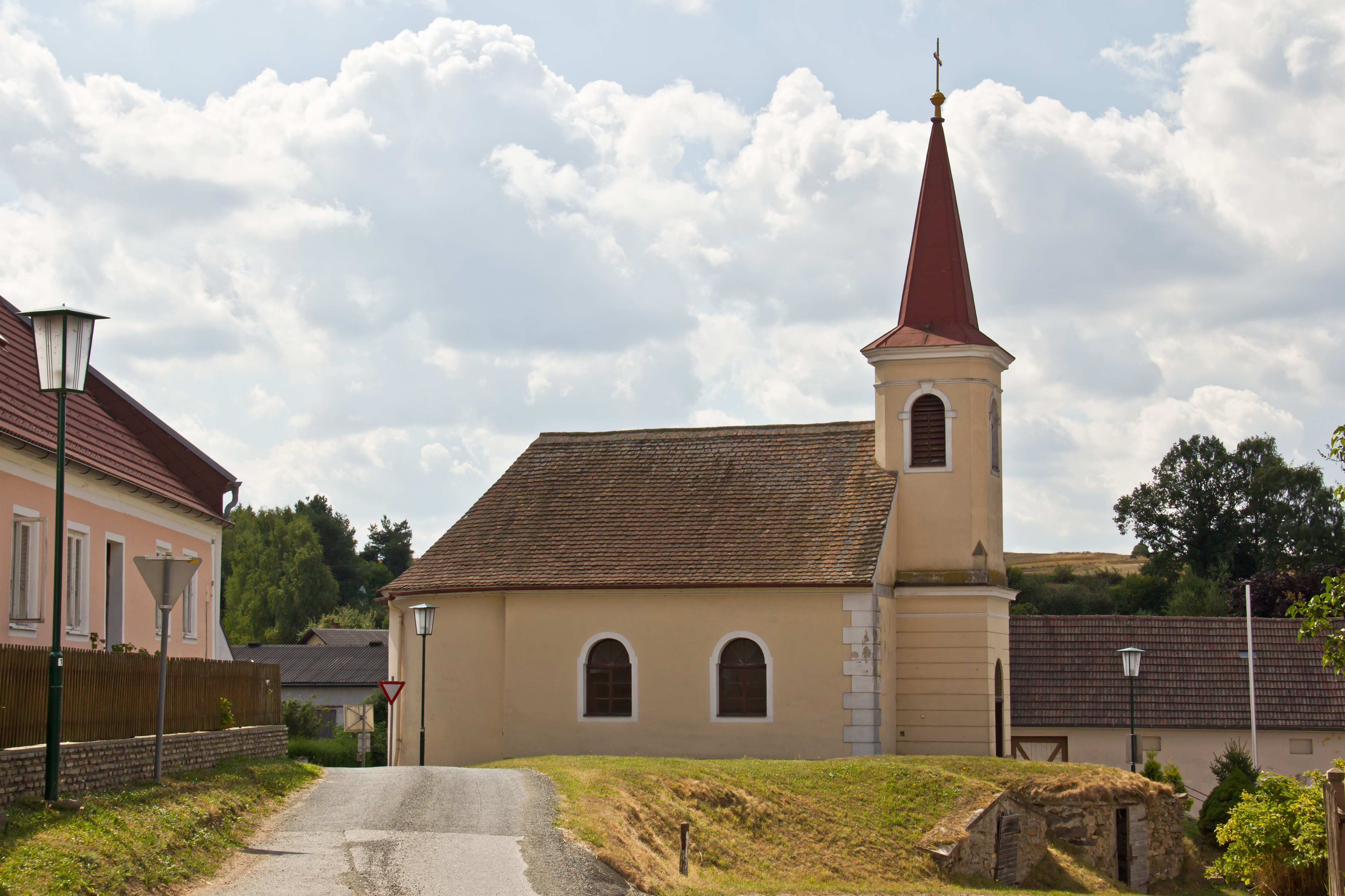 Die Ortskapelle ist ein schlichter Barockbau von 1745 mit Halbkreisapsis und Rundbogenfenstern unter Ziegeldach.